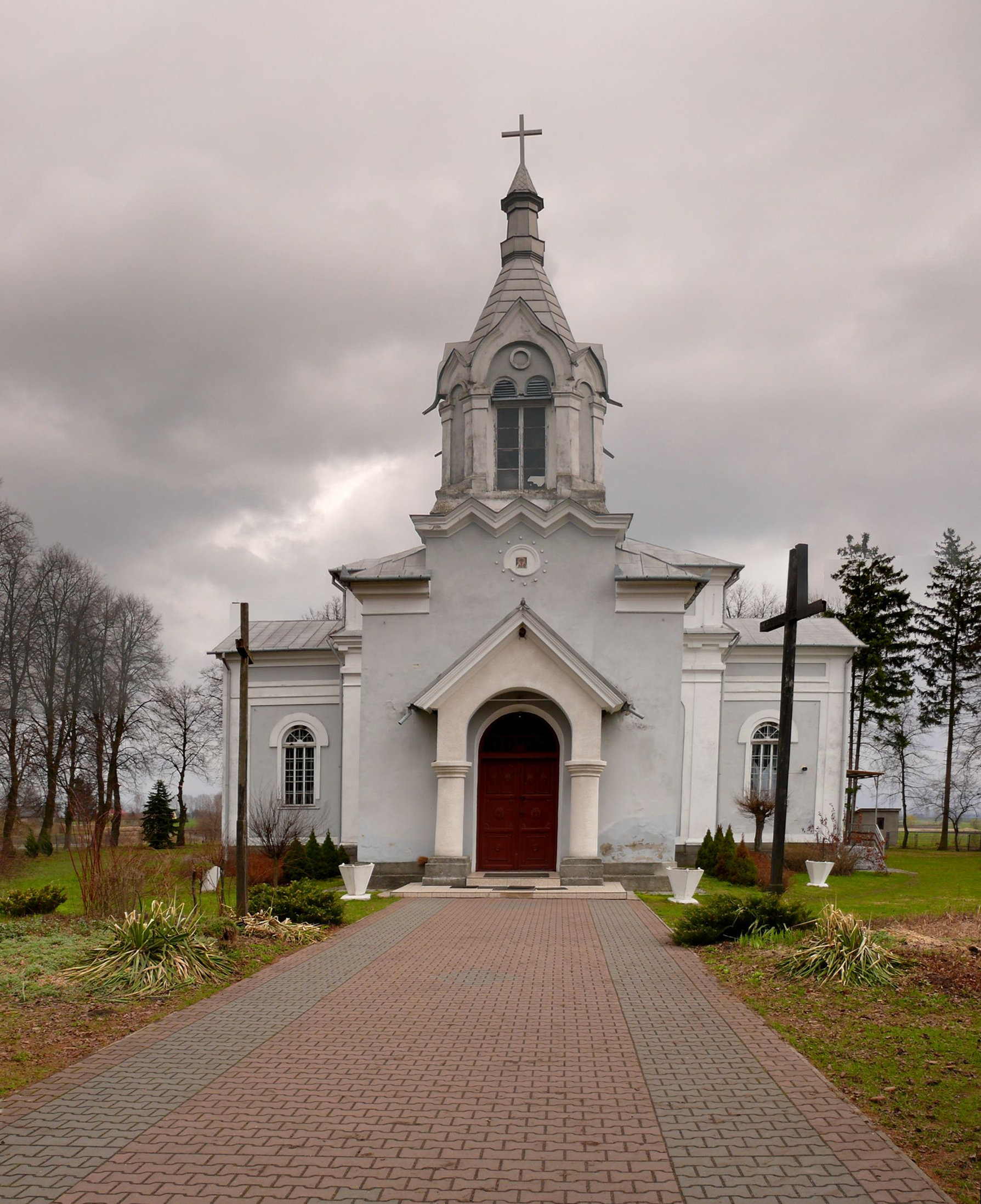 kościół w Czerniczynie, powiat hrubieszowski, województwo lubelskie